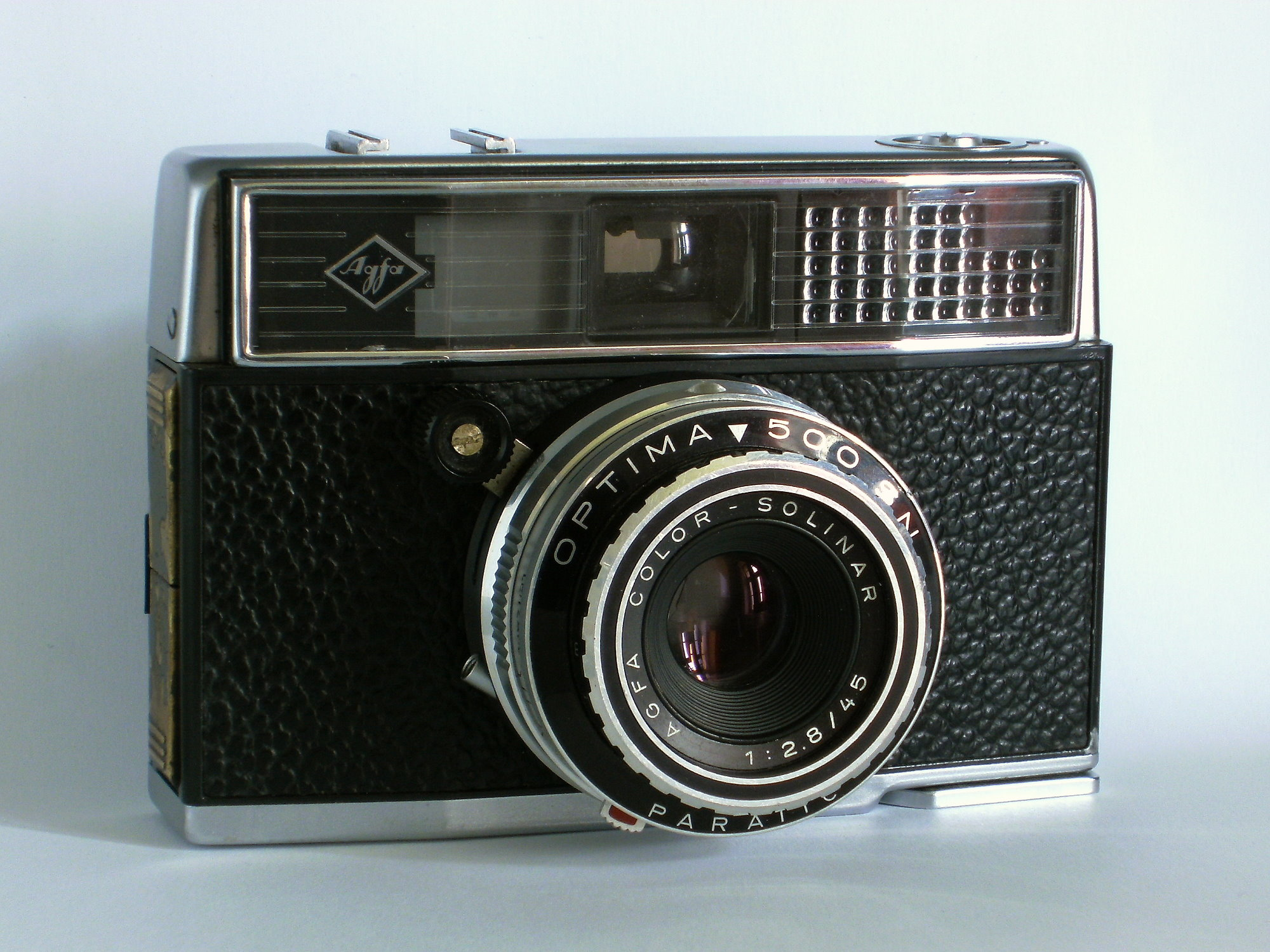 Agfa Optima 500 SN Baujahr 1966